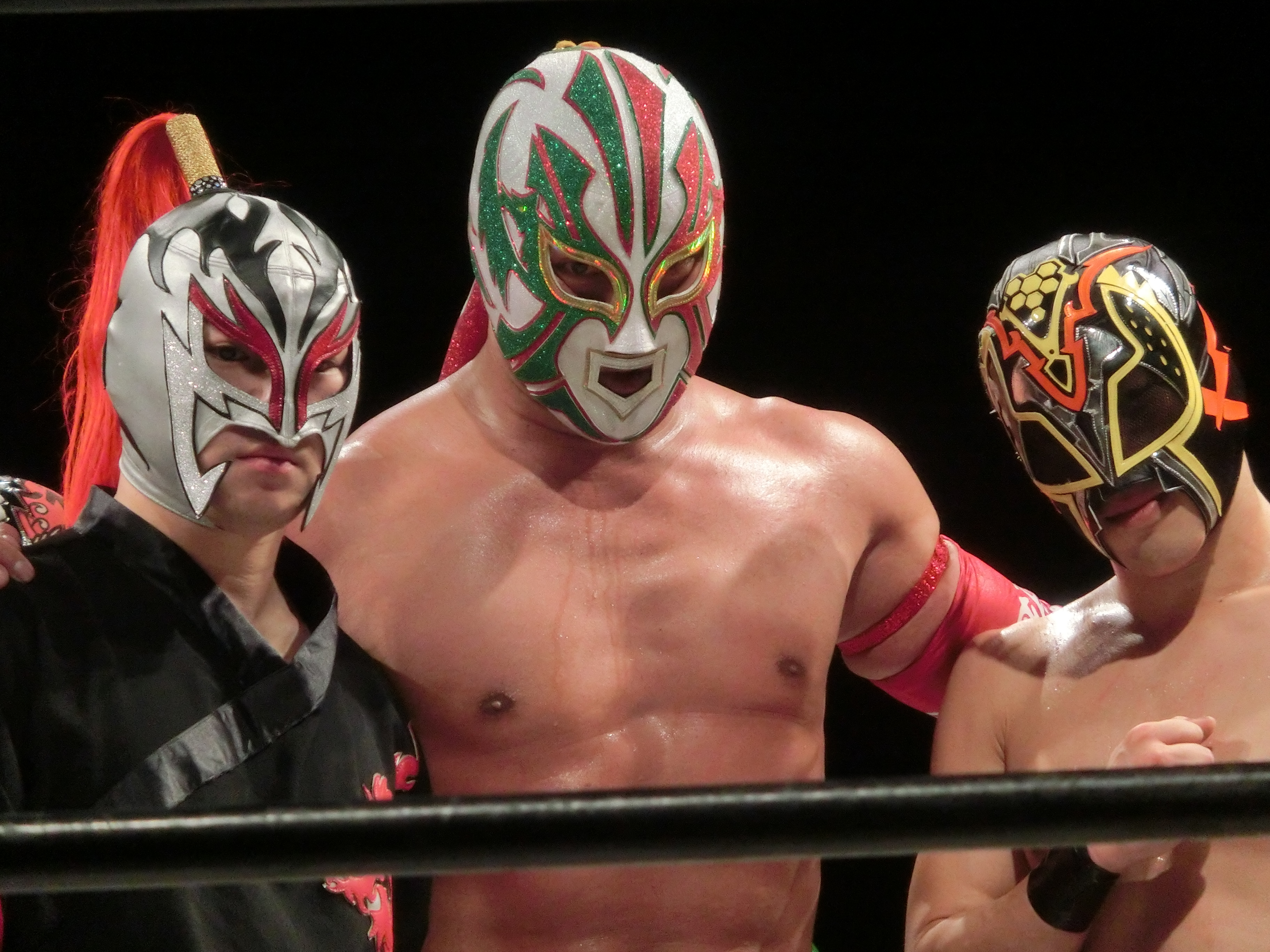 FUKUMEN-MANIA201802